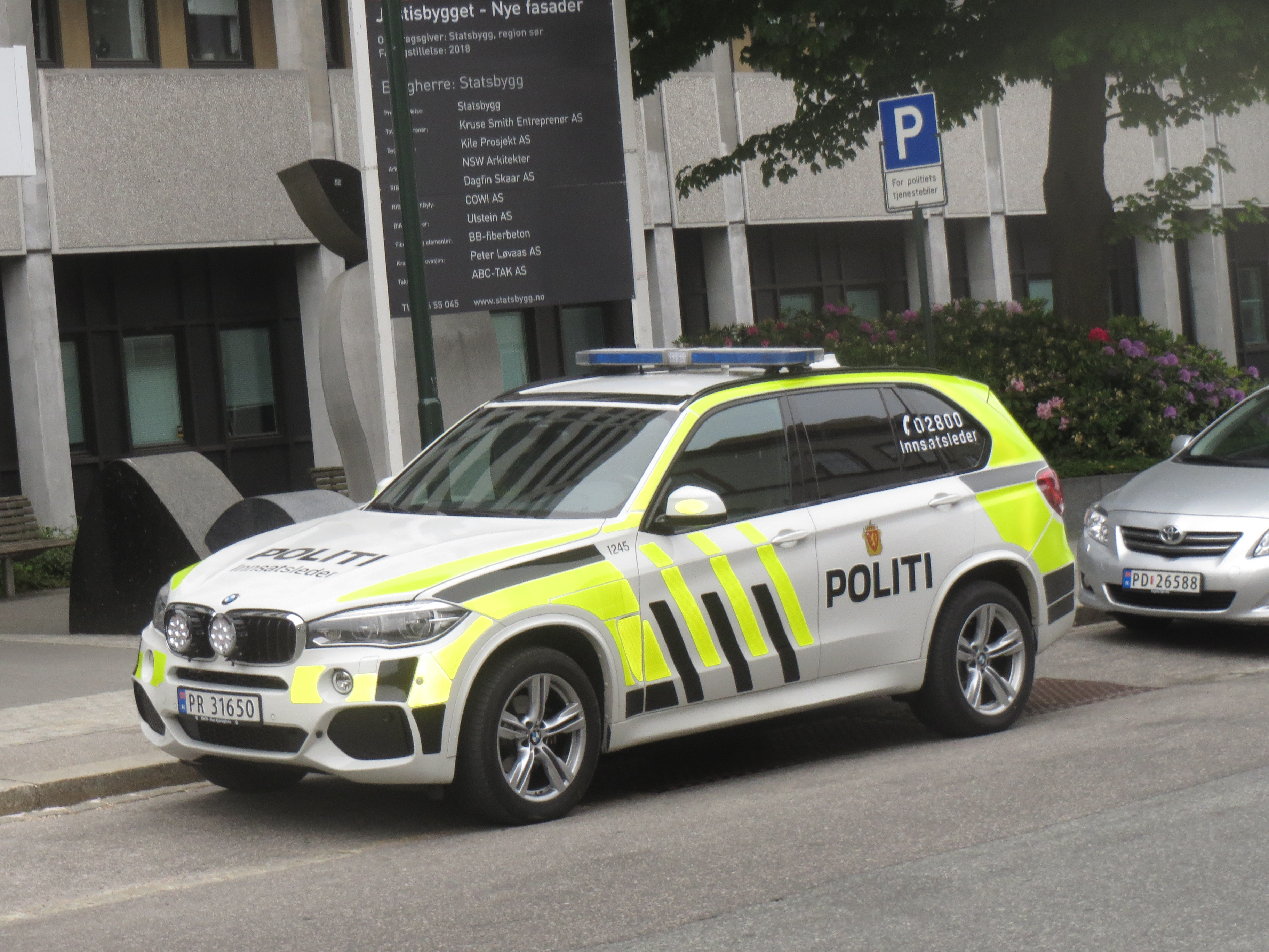 Politibil i Kristiansand i 2017 - 1 BMV